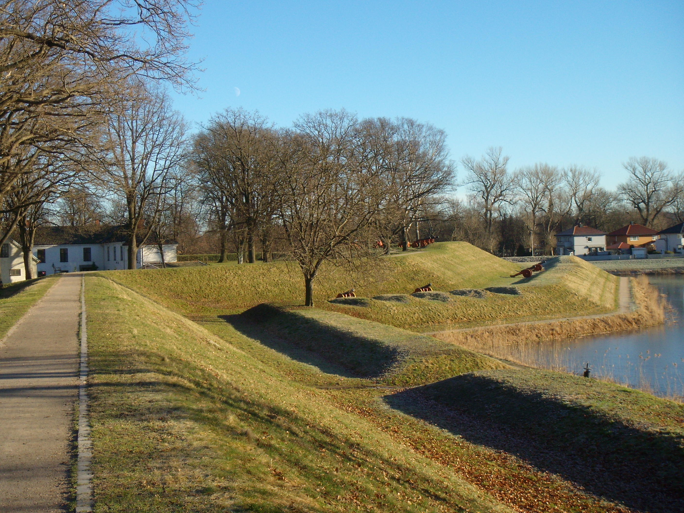 Prins Fredriks bastion i Fredrikstad.